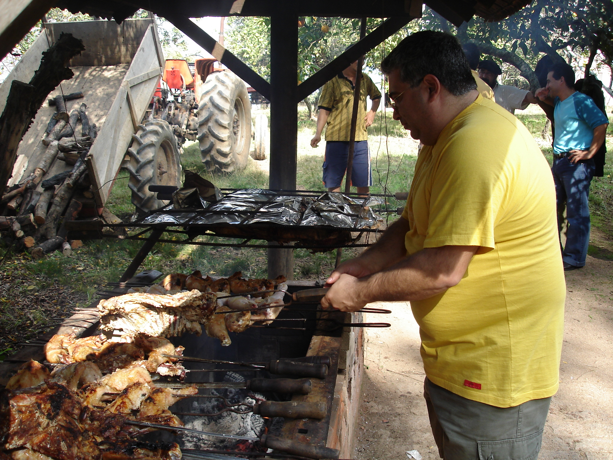 churrasco preparado em currasqueira esterna